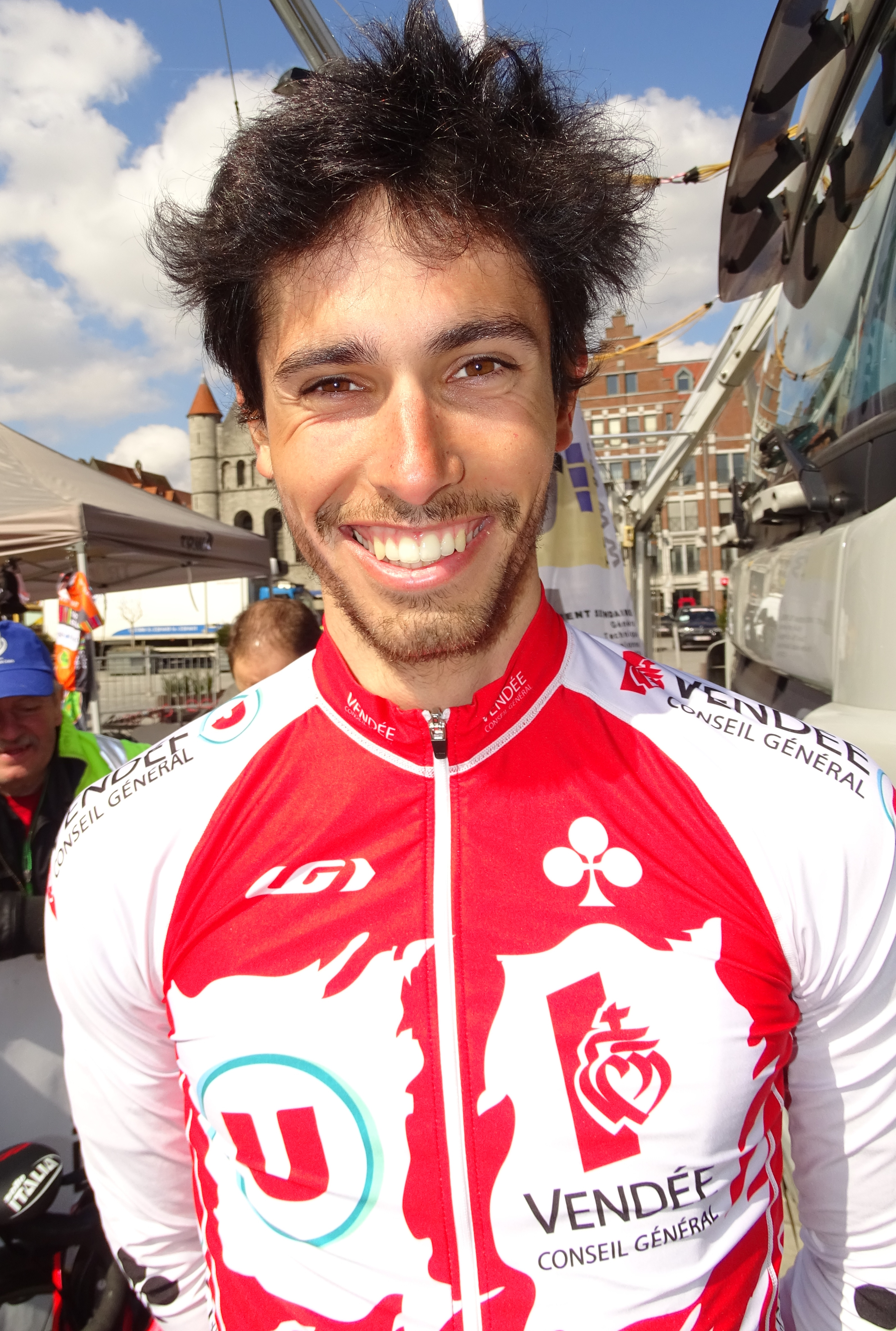 Triptyque des Monts et Châteaux 2015 Depicted person: Romain Guyot Depicted team: Vendée U